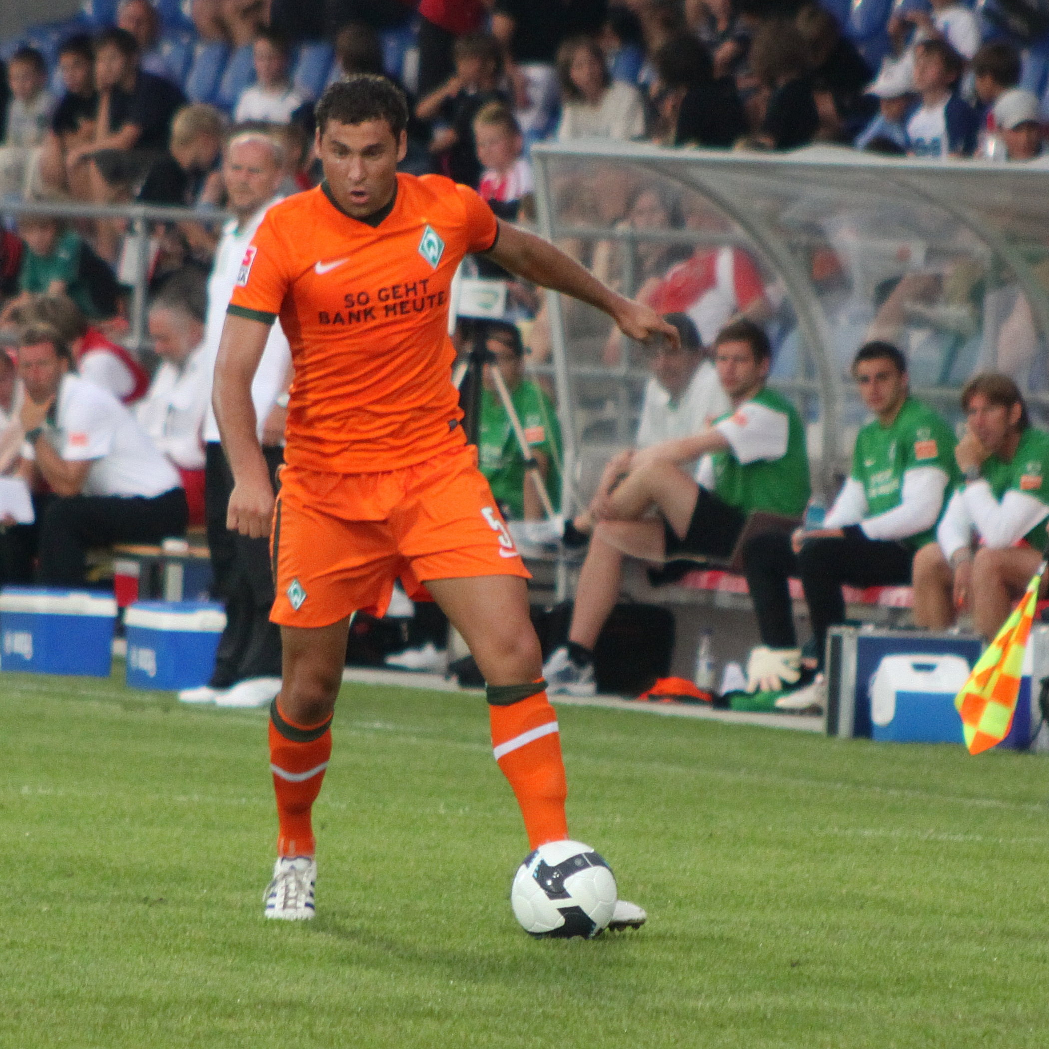 Duško Tošić - SV Werder Bremen (4)